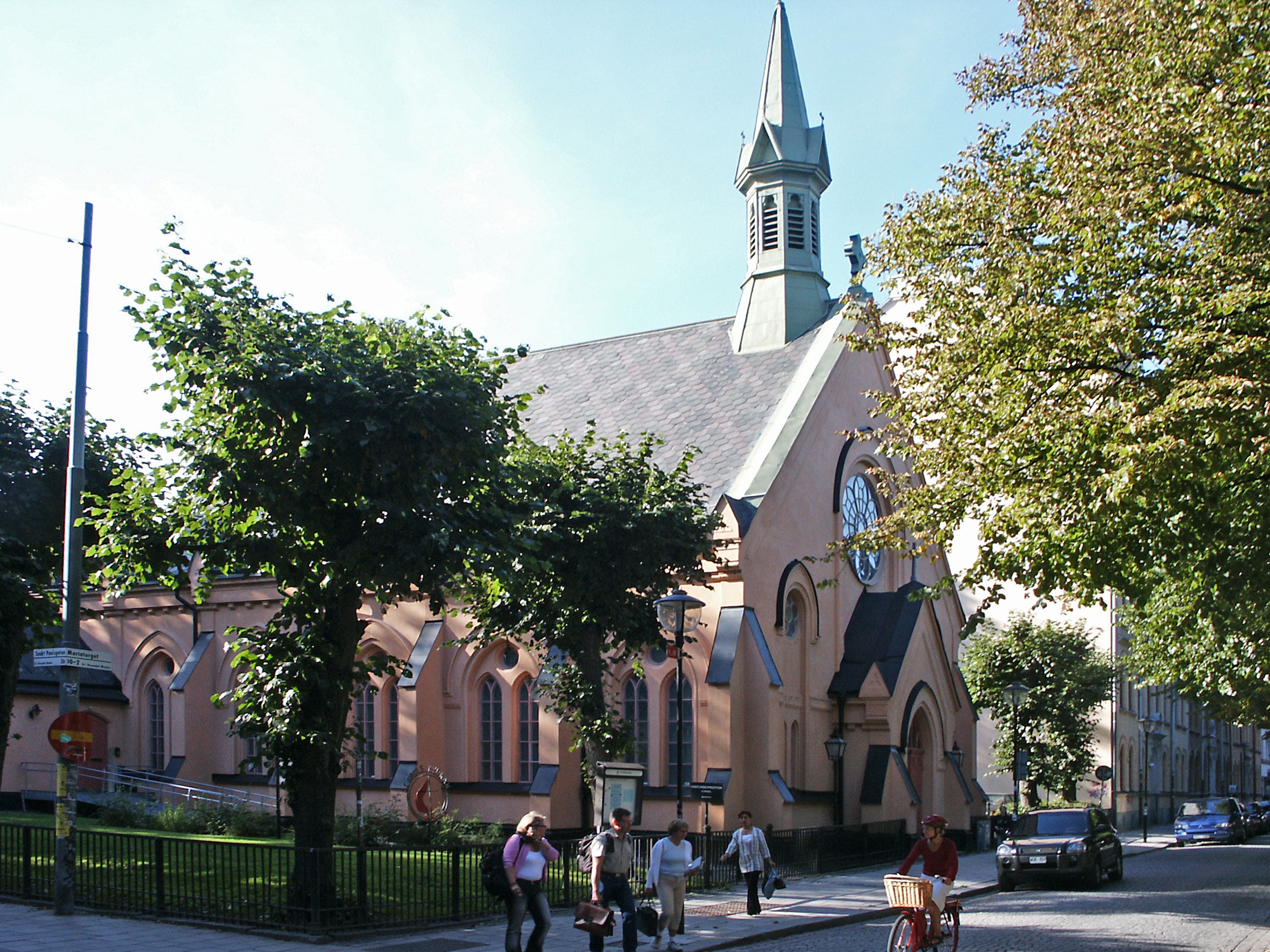 Sankt Paulskyrkan, metodistkyrka på Södermalm i Stockholm